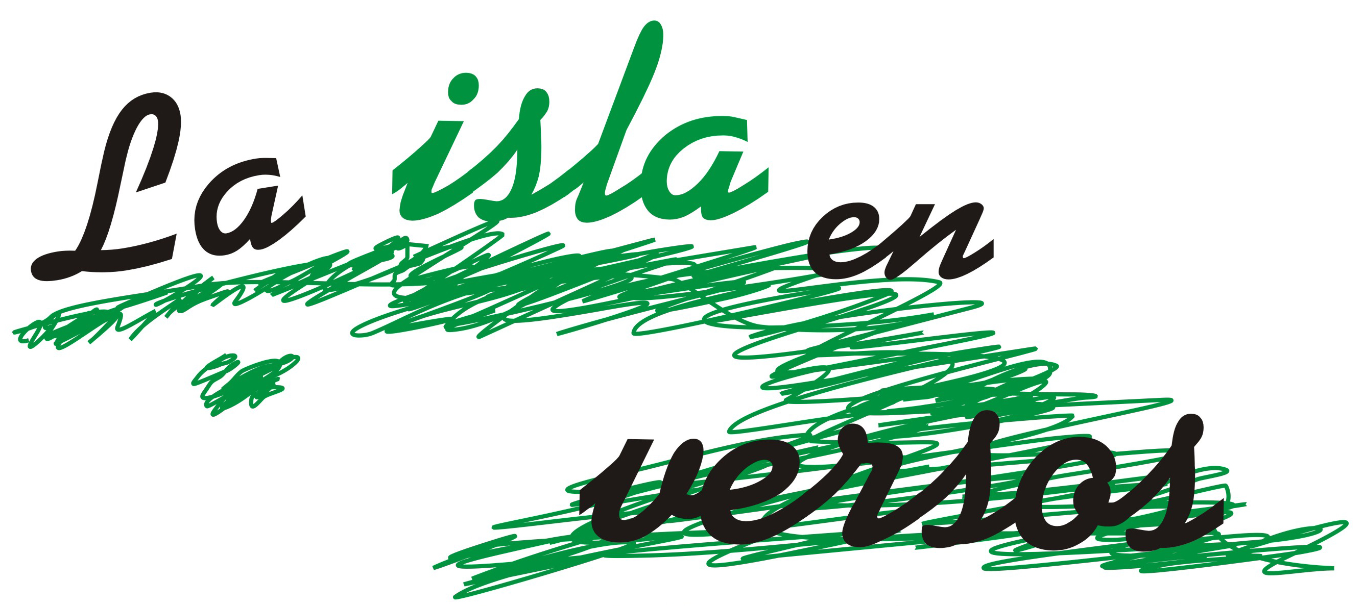 Logo de los Encuentros de Poetas en Cuba "La Isla en Versos"